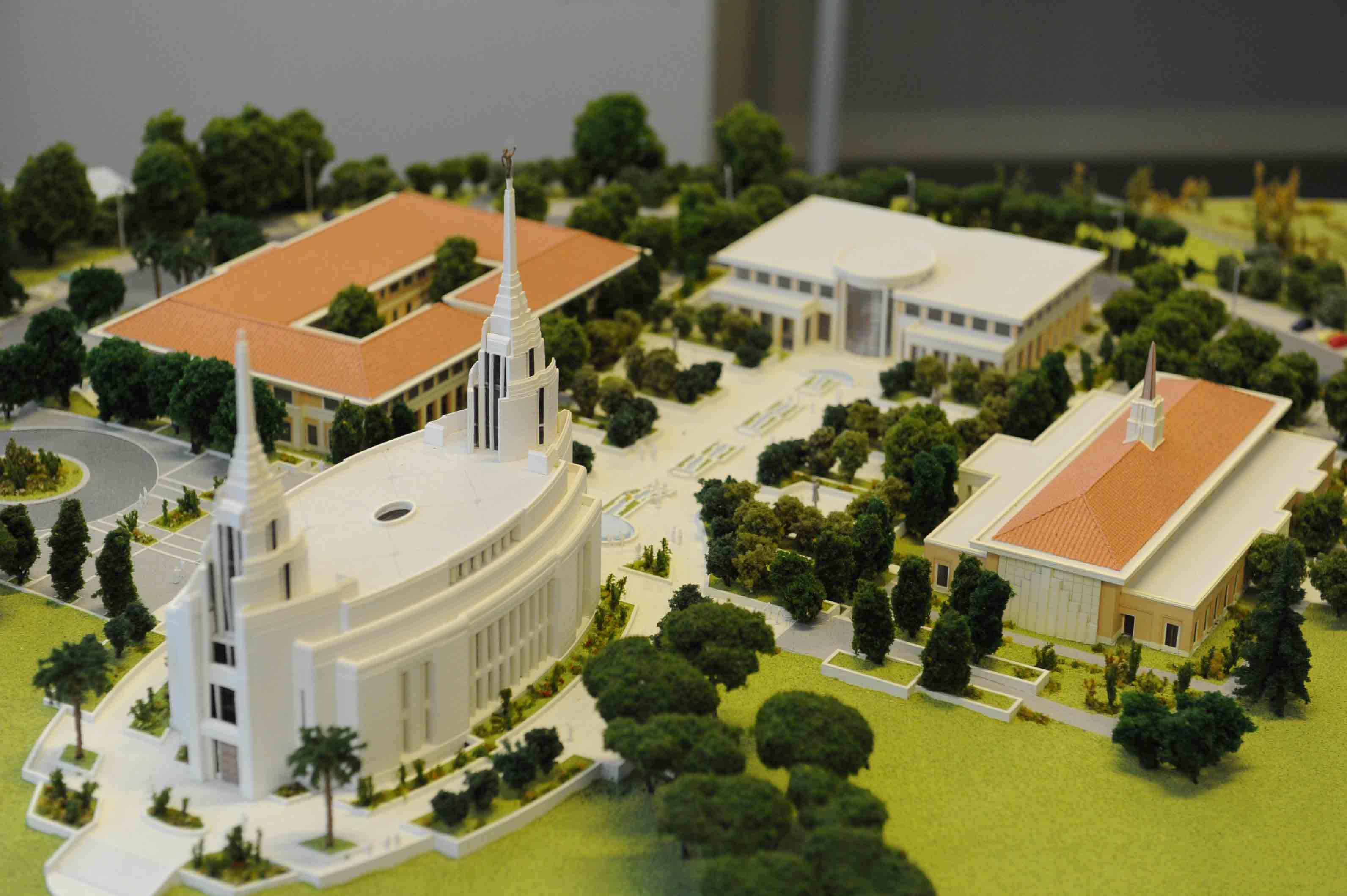 Foto di C. Valletti